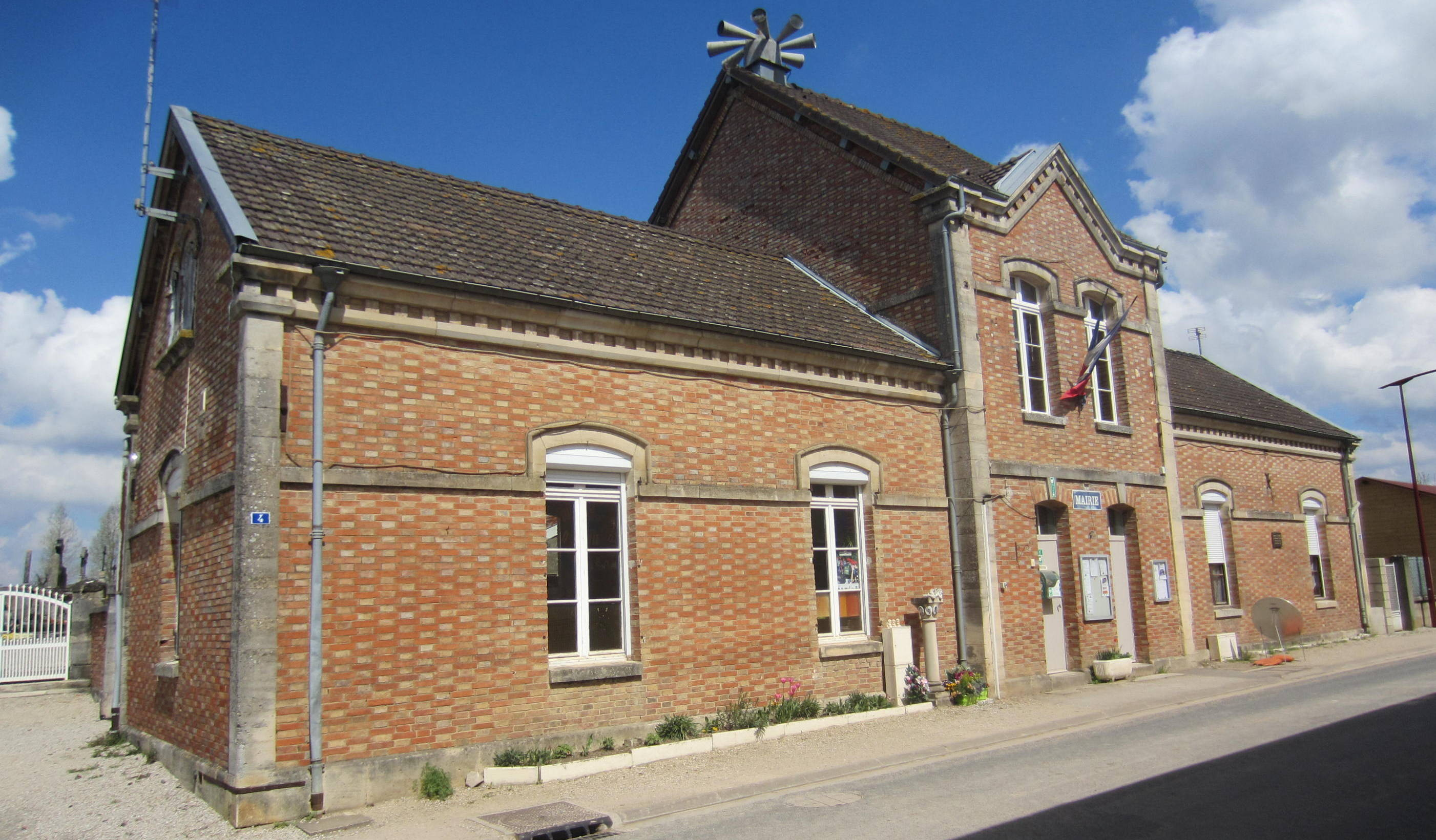 Mairie -école de Saint-Vrain (Marne):La mairie occupe la partie centrale de la photo, l'école la partie gauche tandis que la partie droite était le logement de l'instituteur. Sur cette partie est apposée une plaque en l'hommage du comportement héroïque de l'instituteur en 1944.